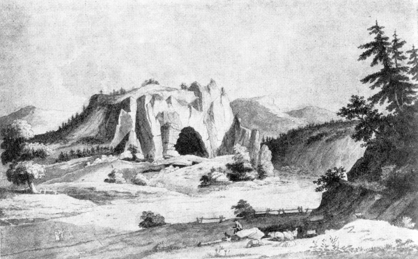 Balcarova skála - Balcarka počátkem 19. století